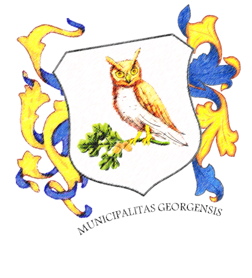 Blazon: u srebrnom sova u prirodnim bojama stoji na zelenoj hrastovoj grančici koja na desnom kraju ima tri zelena lista i dva zlatna žira.